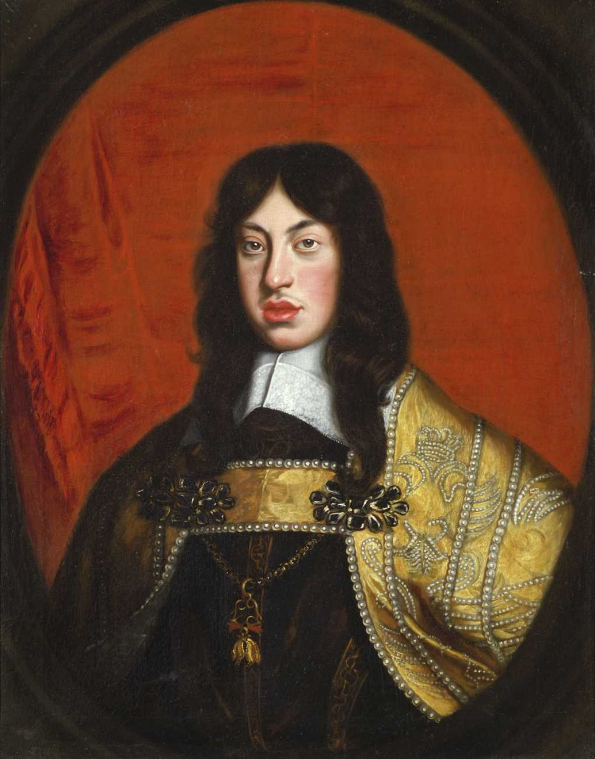 Provenienz: Inventarstempel Schloss Herrenhausen (Hannover) mit Nummerierung 21 und alter Klebezettel mit Inventarnummer (?) "A. 408"; Auktion Sotheby's "Works of art from the Royal House of Hanover", Schloss Marienburg, 5.-15. Oktober 2005, Kat.-Nr. 5020 (Zusatzkatalog IV)